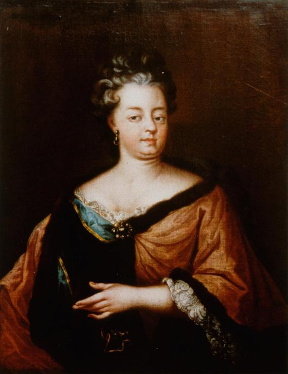 Françoise Salomé Wurmser de Vendenheim, épouse de Frédéric-Louis II de Waldner